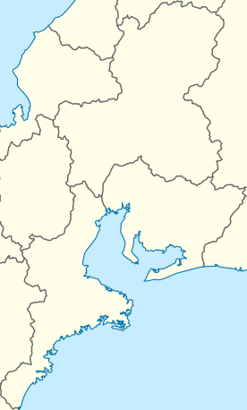 日本の東海三県（愛知県・岐阜県・三重県）